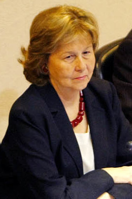 Eduardo Frei participó de la votación del Senado del presupuesto 2010.